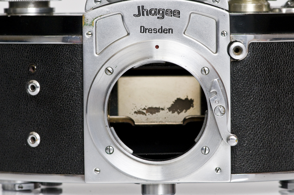 Ihagee Kine Exakta Typ 3 Objektivbajonett und Blitzanschluß